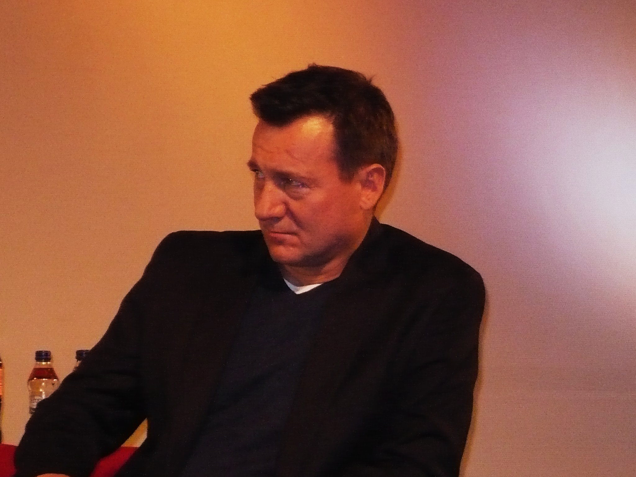 Robert Więckiewicz w Nowej Rudzie.